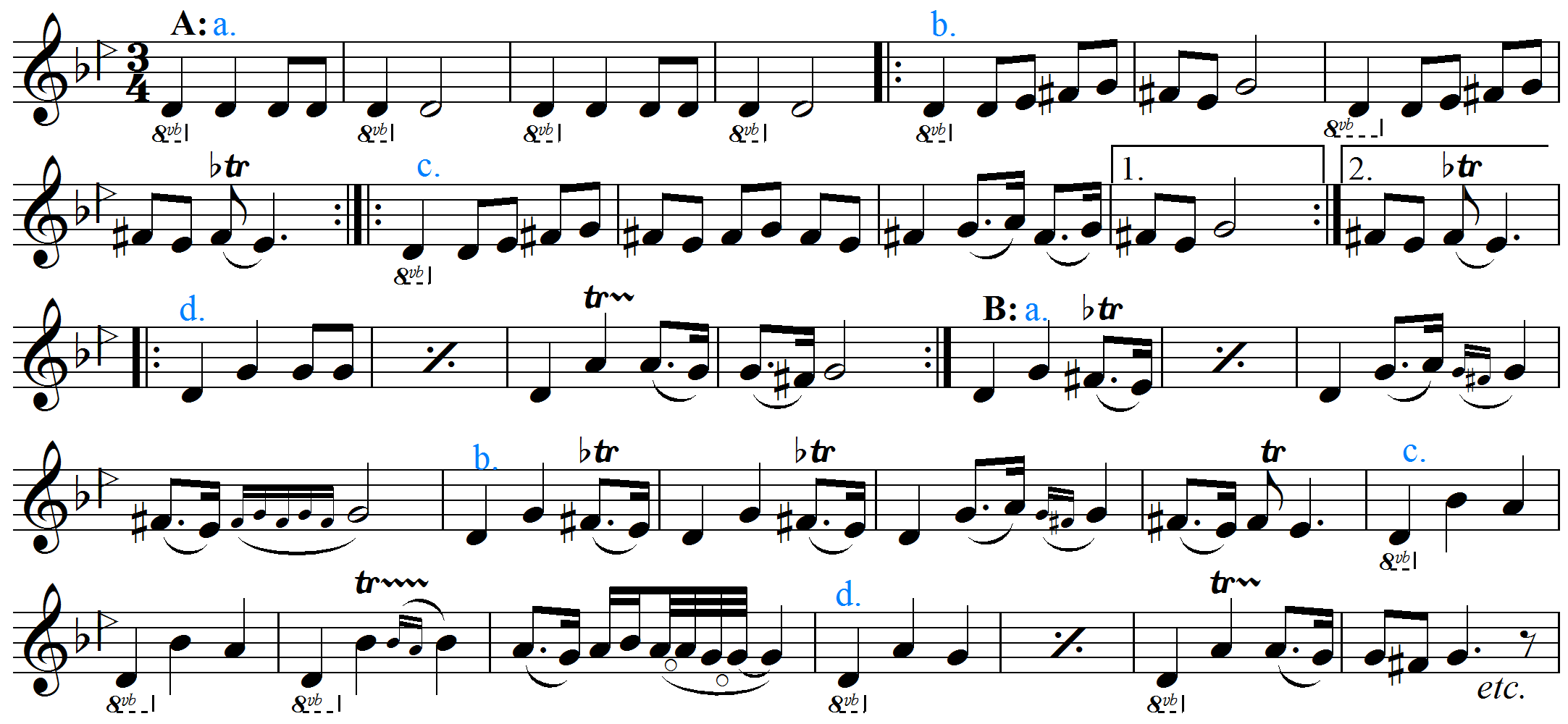 رنگ فرح‌انگیز از ردیف موسی معروفی دردستگاه بیات اصفهان سل